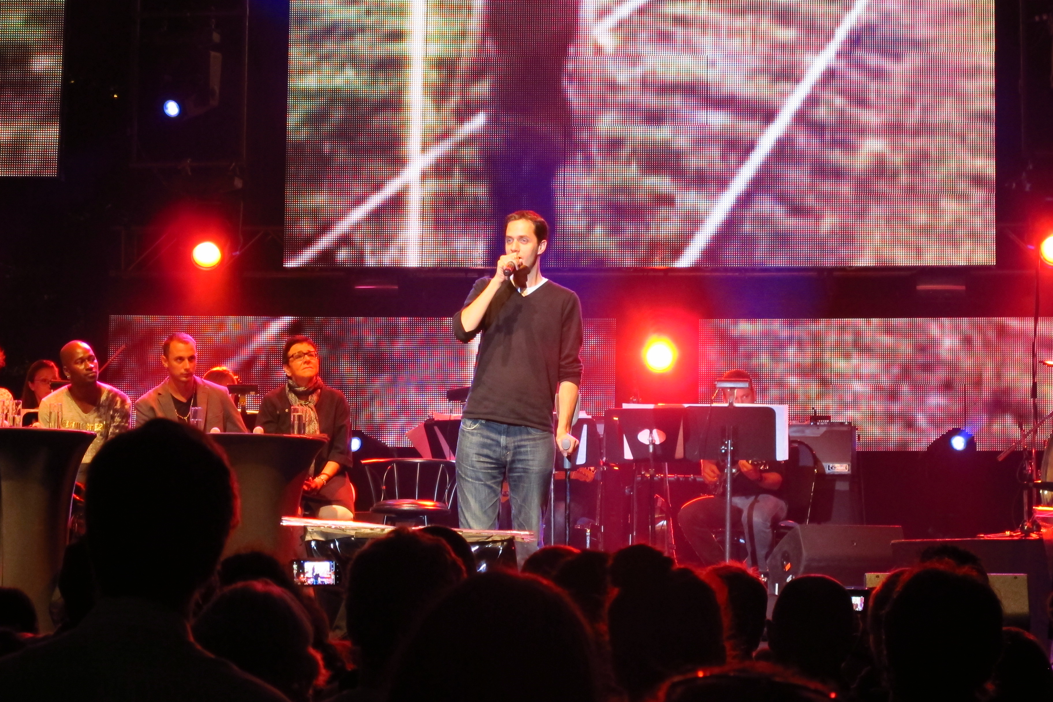 Grand Corps Malade au Parc de la Francophonie de Québec dans le cadre du Forum mondial de la langue française 2012.